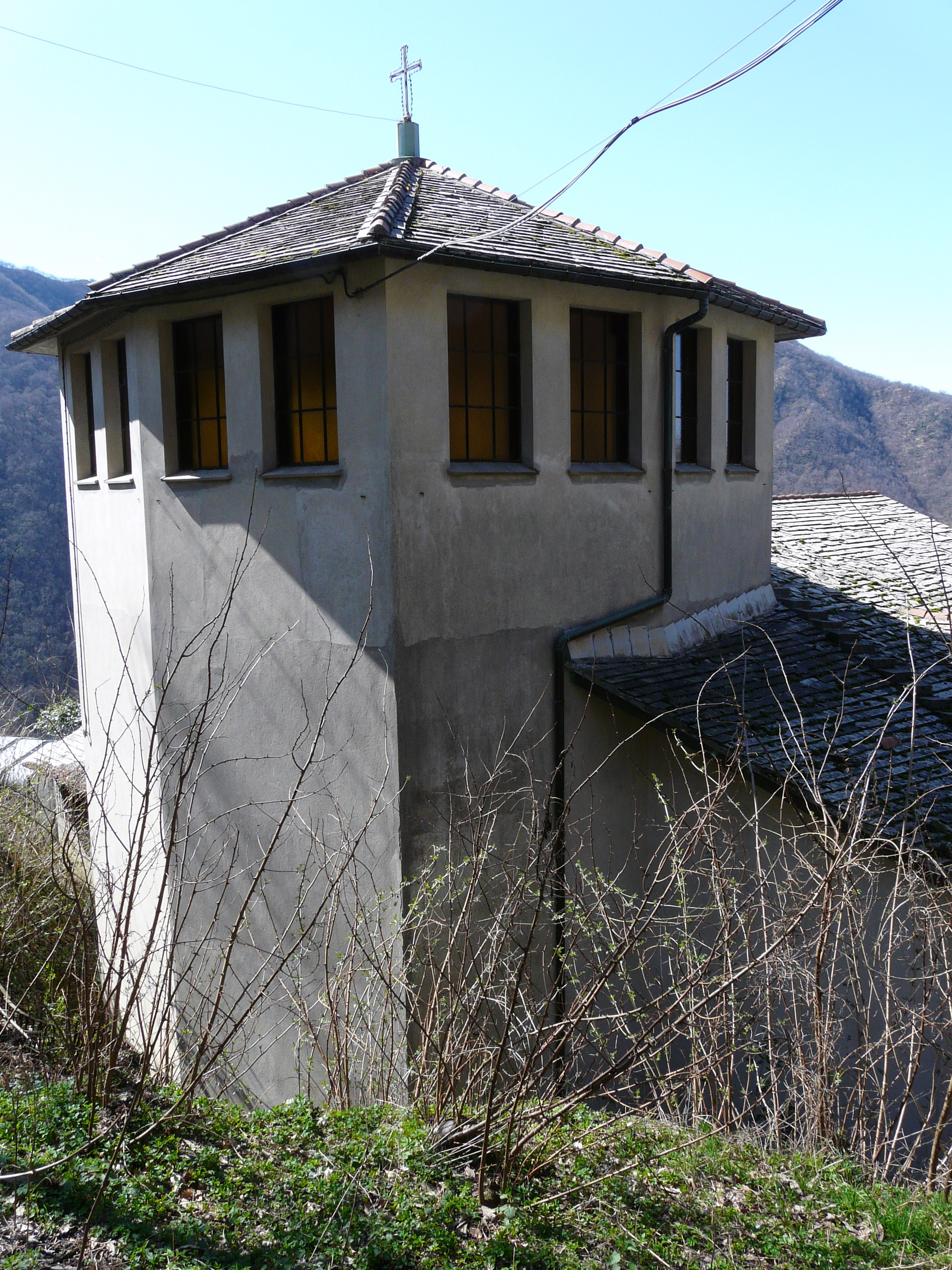 Chiesa di San Siro, Viganego, Bargagli, Liguria, Italia